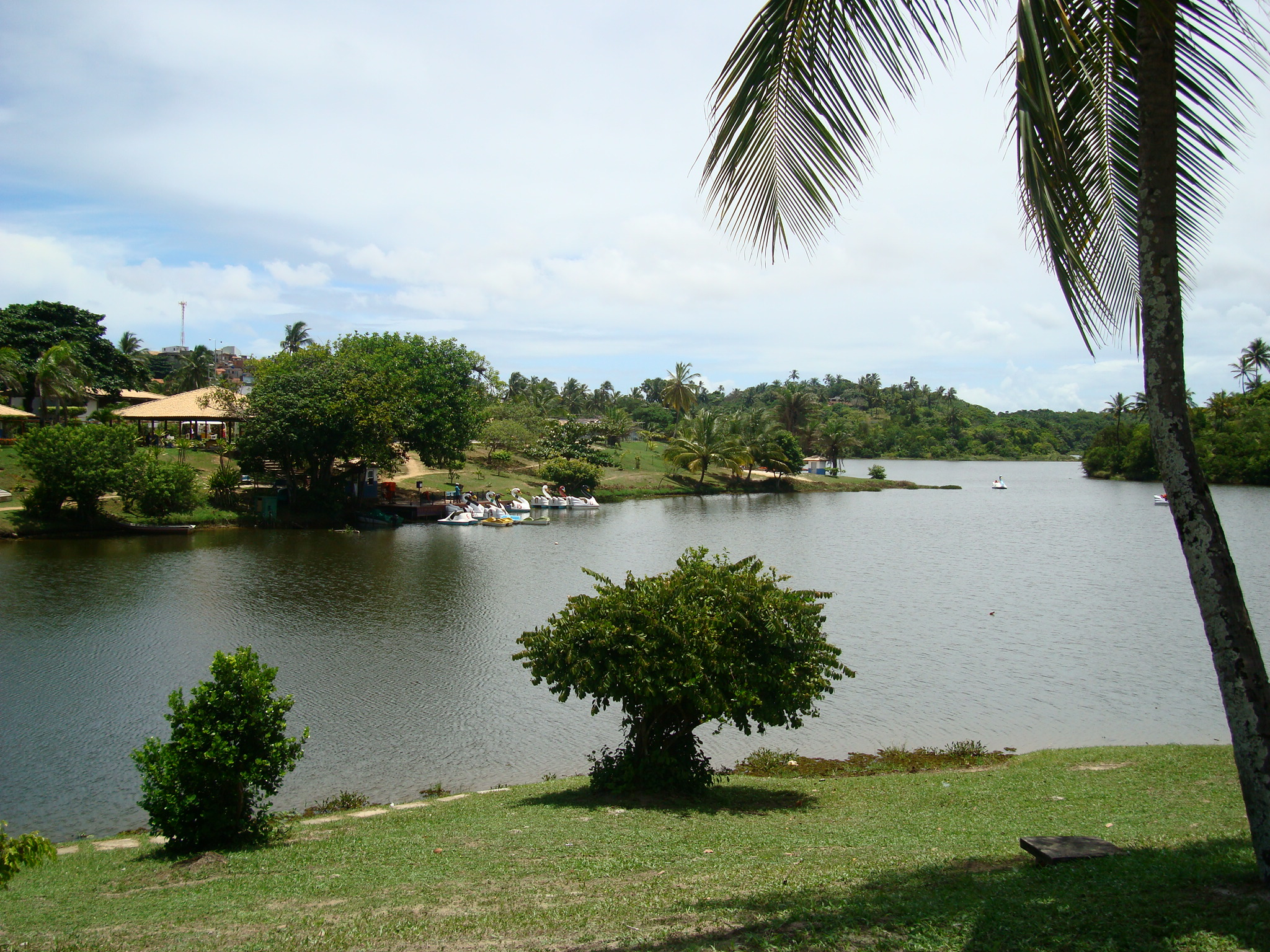 Lagoa do Parque Metropolitano de Pituaçu, Salvador, Bahia, Brasil.